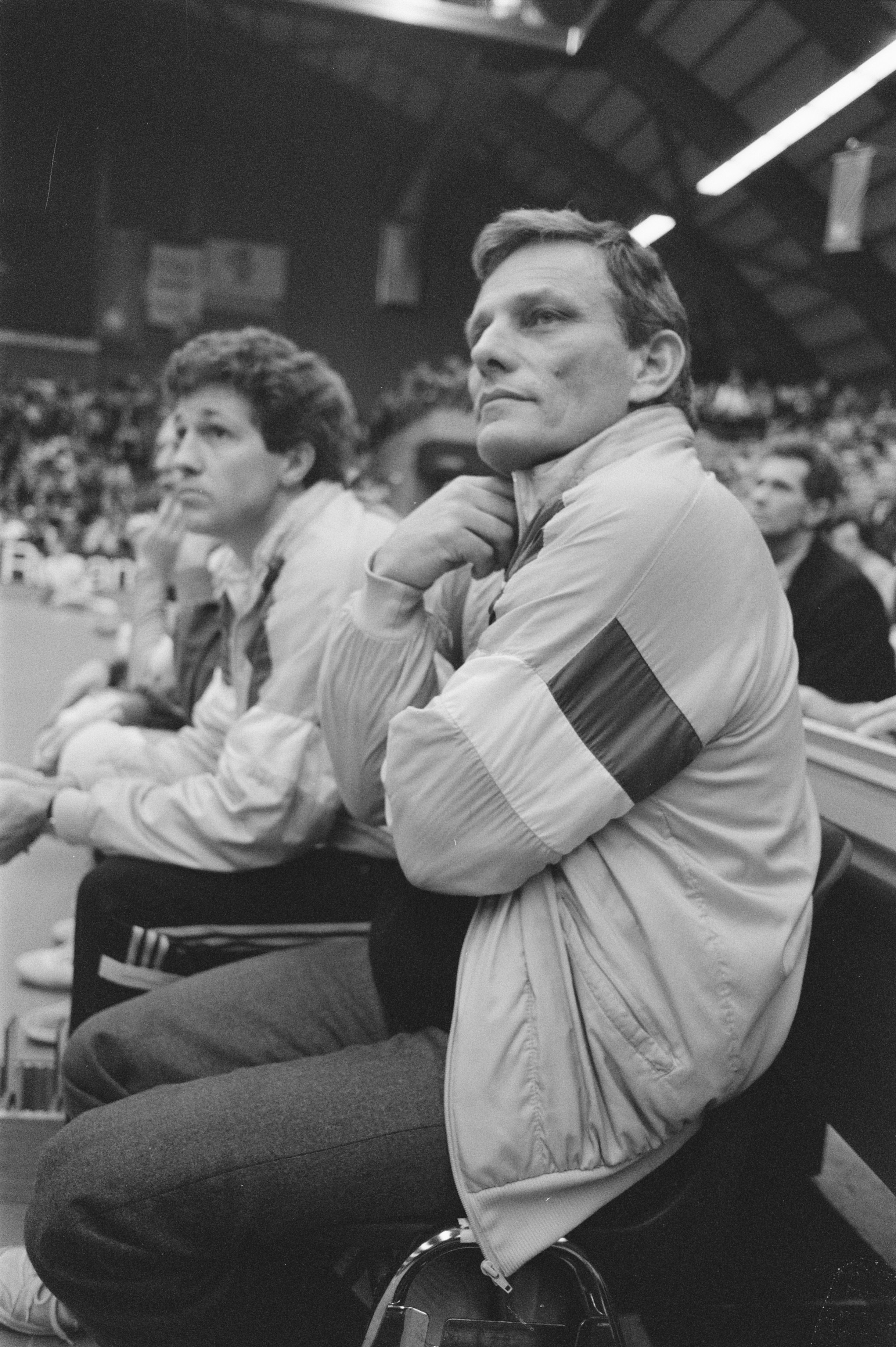 Collectie / Archief : Fotocollectie Anefo Reportage / Serie : [ onbekend ] Beschrijving : Pre-Olympisch volleybaltoernooi in Amsterdam; Nederlandse coach Arie Selinger Datum : 31 januari 1988 Locatie : Amsterdam, Noord-Holland Trefwoorden : toernooien, volleybal Persoonsnaam : Arie Selinger Fotograaf : Molendijk, Bart / Anefo Auteursrechthebbende : Nationaal Archief Materiaalsoort : Negatief (zwart/wit) Nummer archiefinventaris : bekijk toegang 2.24.01.05 Bestanddeelnummer : 934-1798